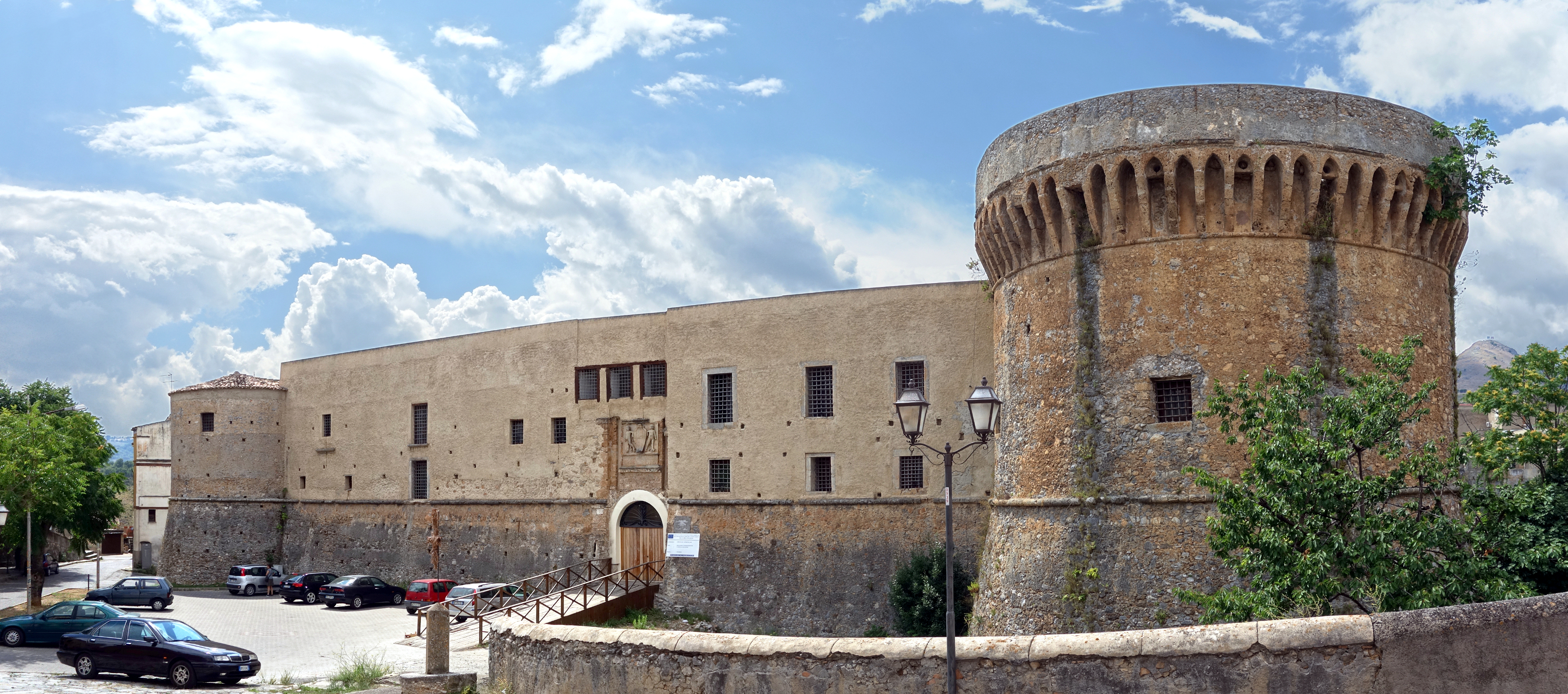 Castello Aragonese This is a photo of a monument which is part of cultural heritage of Italy.